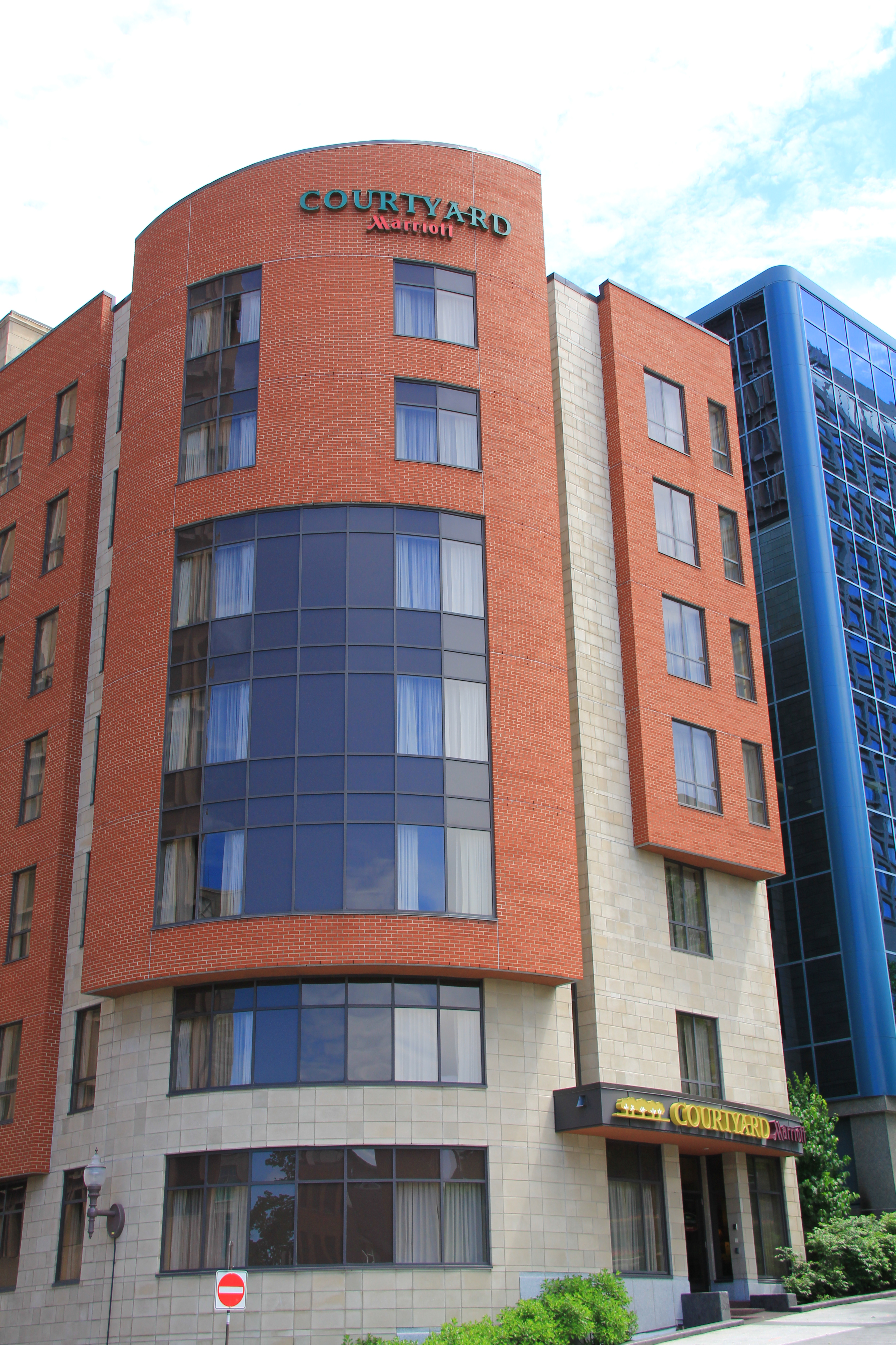 L'Hôtel Courtyard Marriot sur l'avenue Honoré-Mercier à Québec.